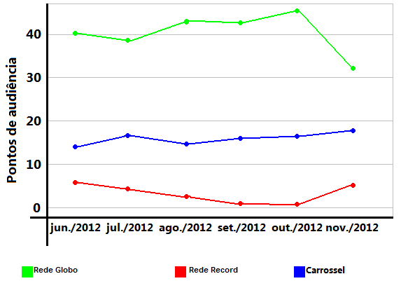 Média do IBOPE das telenovelas Carrossel, Avenida Brasil e Rebeldes na Grande São Paulo (comparação em português)